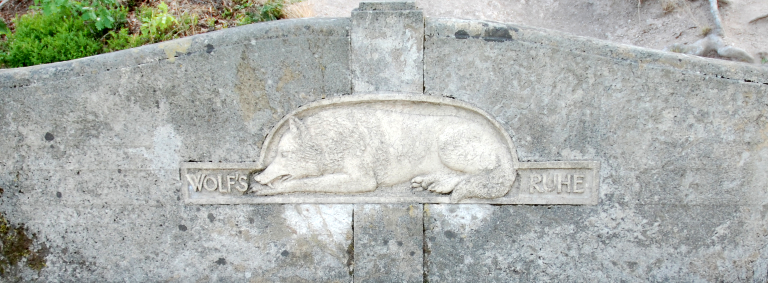 Detail reliéfu se spícím vlkem na kamenné lavičce v karlovarských lázeňských lesích